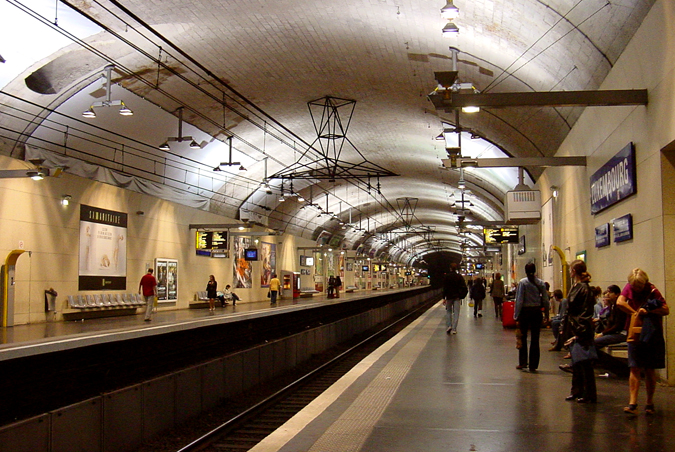 Gare RER du Luxembourg, Paris Ve arrondissement.